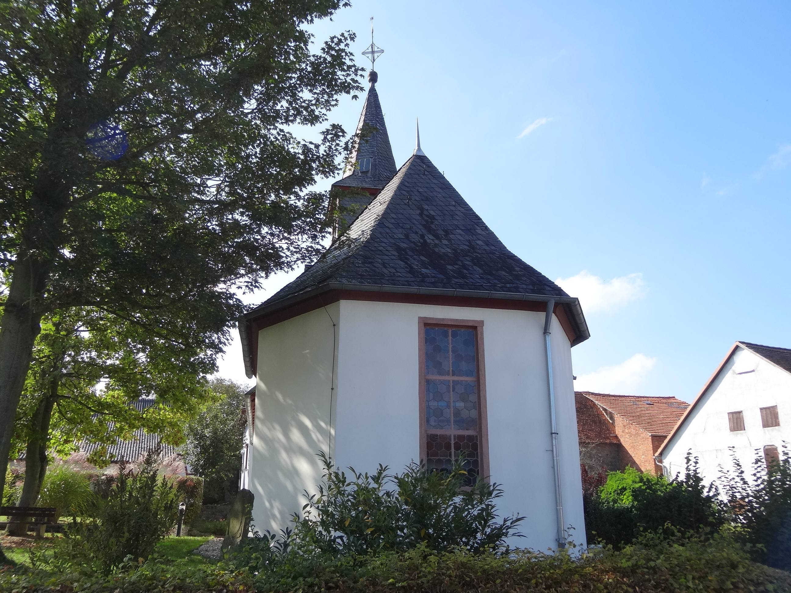 Ev. Pfarrkirche Ebersgöns